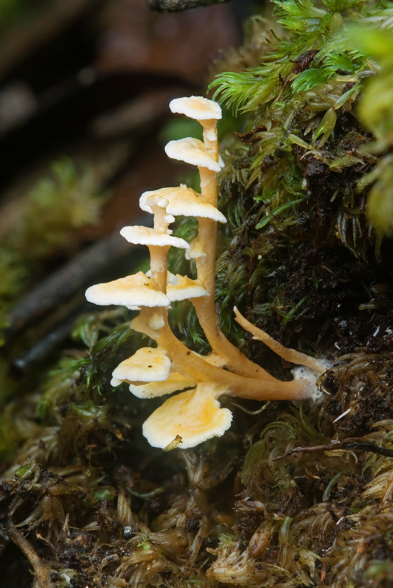 Podoserpula pusio, Collinsvale, Tasmania, Australia